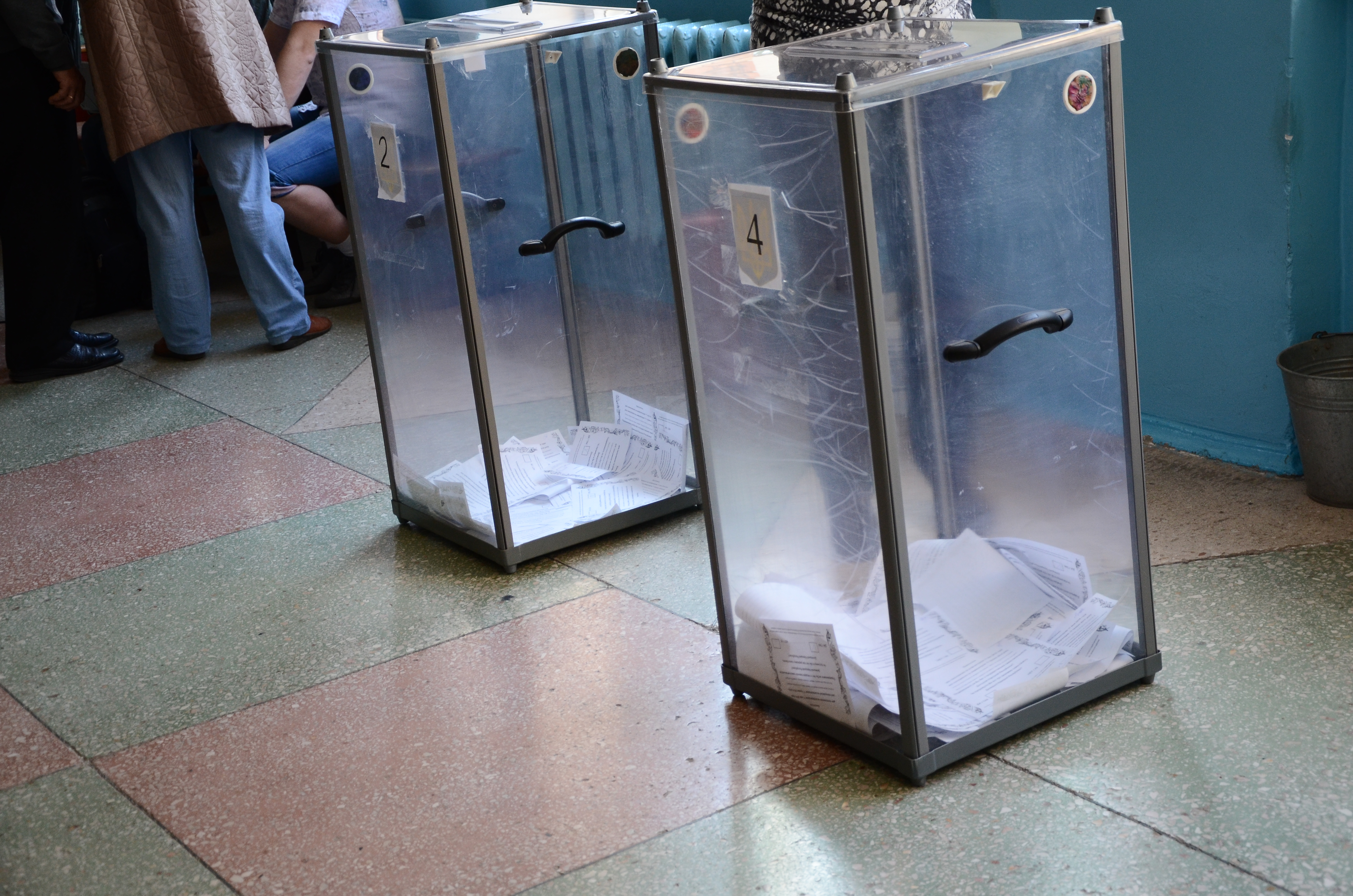 Референдум в Донецке